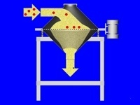 Wirbelstromsiebmaschine der AZO GmbH + Co. KG